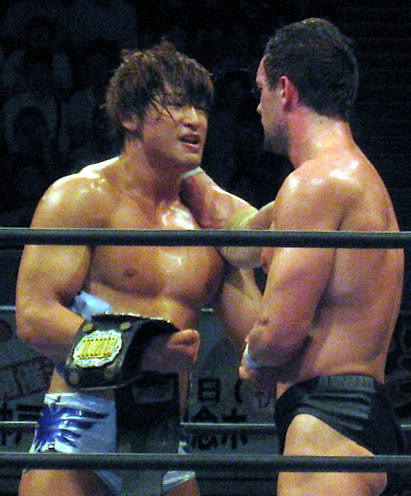 2011年6月18日 大阪大会 「DOMINION6.18」 飯伏幸太（左）とプリンス・デヴィット（右）